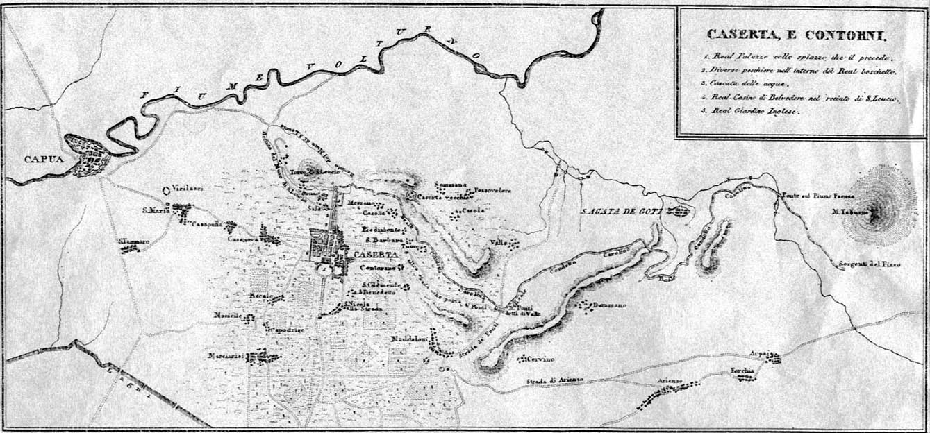 Caserta - Acquedotto Carolino dalle sorgenti del Fizzo alla Reggia di Caserta in F. Patturelli, Caserta e San Leucio, Napoli 1826 Tav (Caserta e contorni)